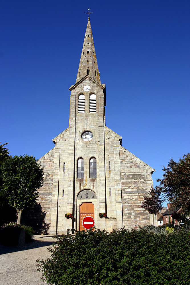 Eglise Notre Dame du Gavel